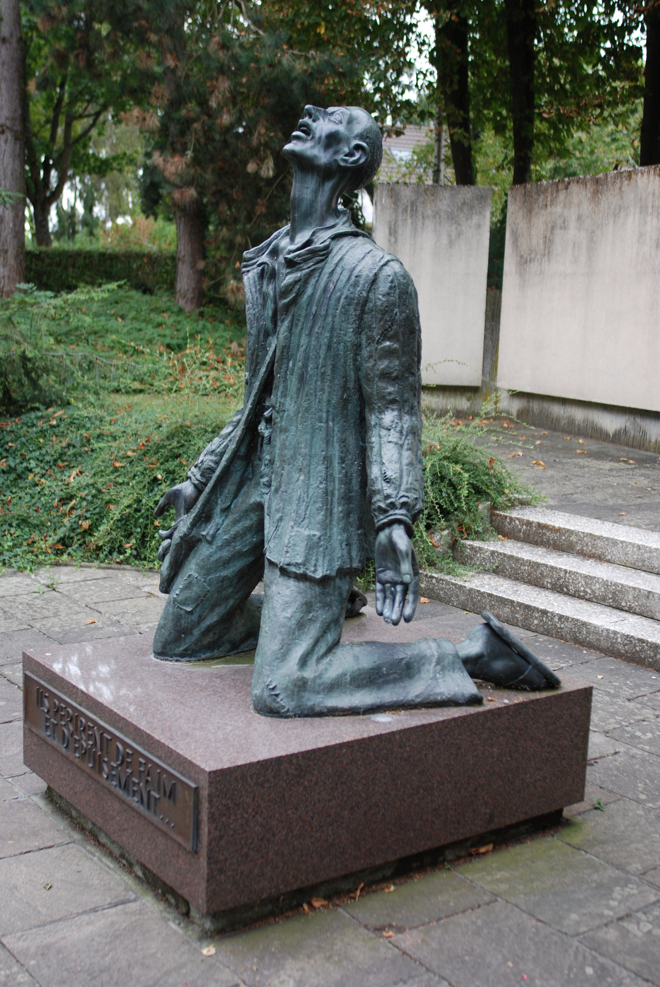 Gedenkstätte der Stadt Mülhausen für die 17.000 Getöteten im Gefangenenlager von Tambow